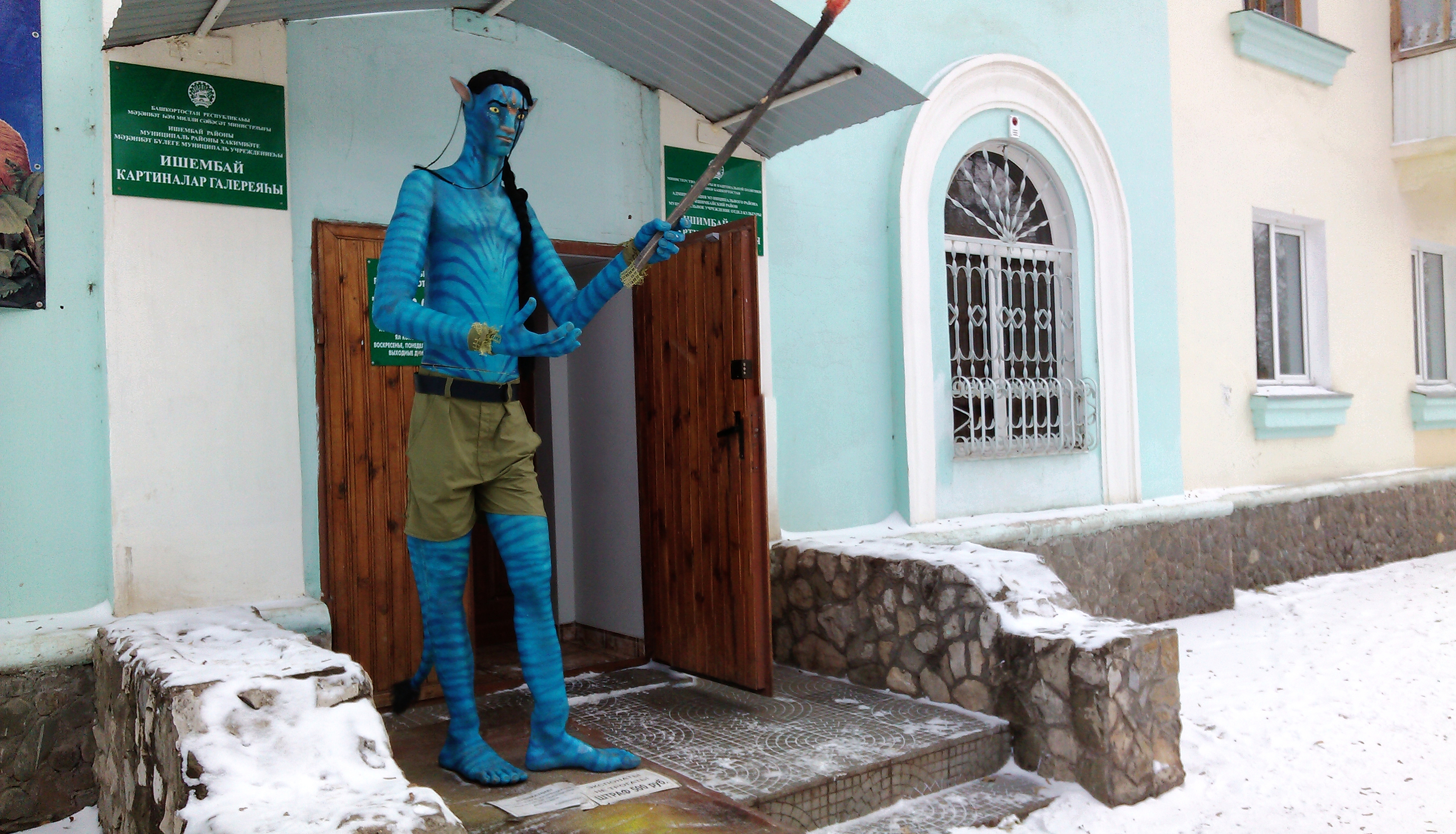 Вход в Ишимбайскую картинную галерею